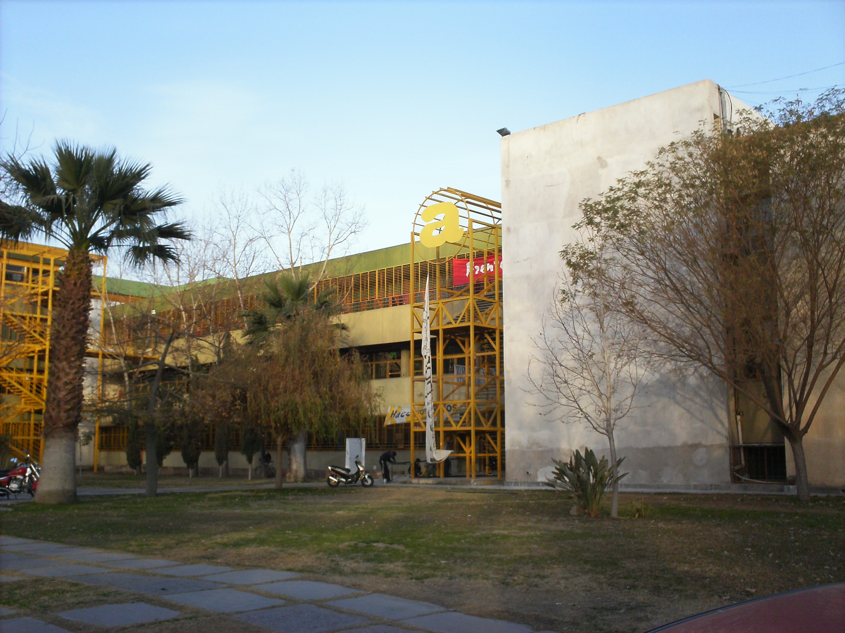 la facultad de arquitectura en el universitario complejo islas malvinas